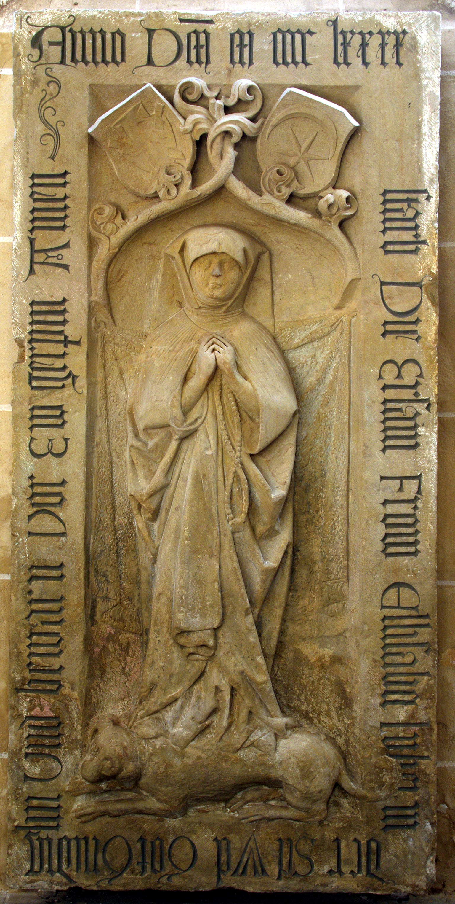 Grabstein der bedeutenden Markgröninger Bürgerin Elisabeth Volland (geborene Lyher(in)) aus dem 15. Jahrhundert in der nach ihr benannten Vollandkapelle der Bartholomäuskirche Markgröningen.